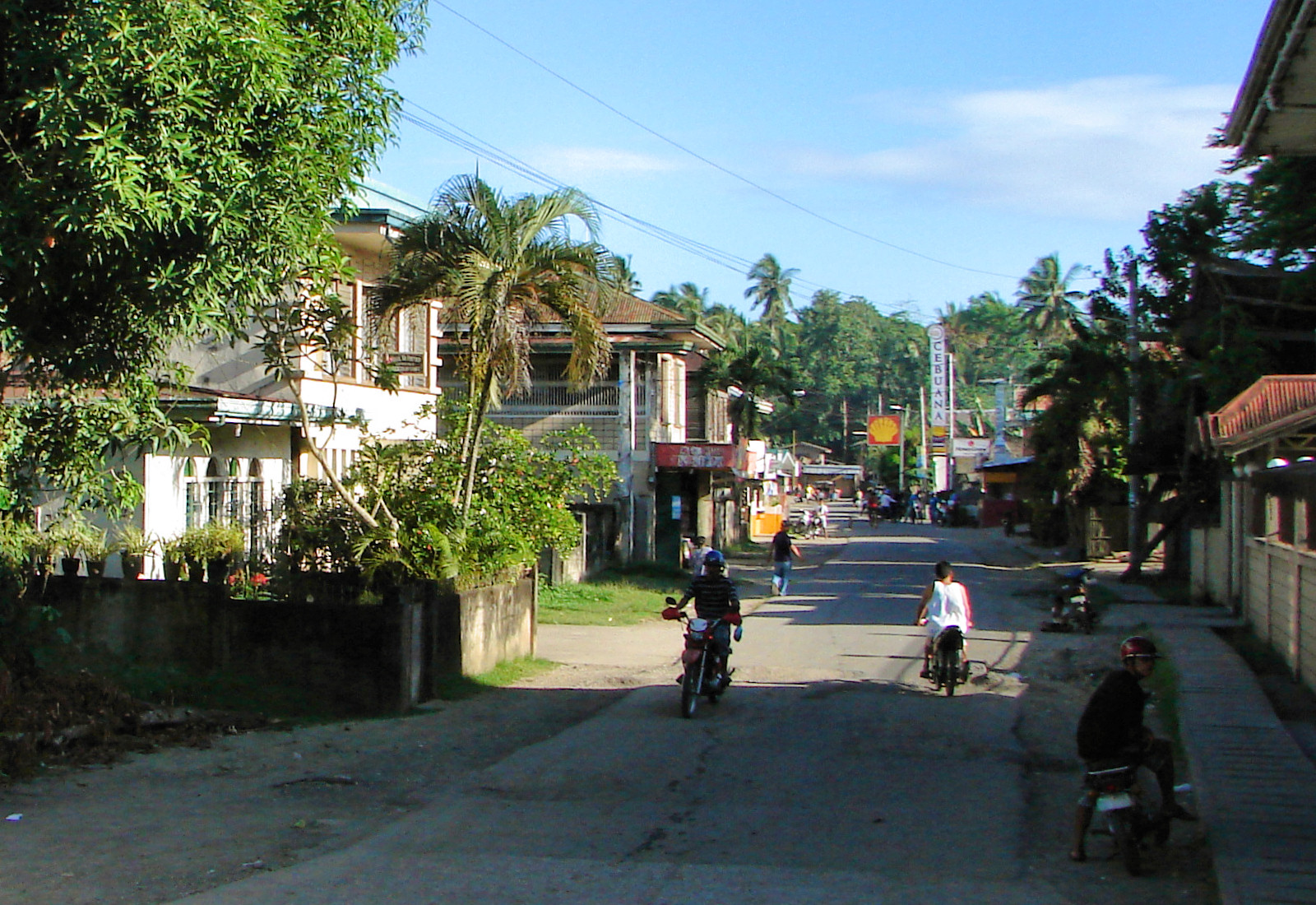 Inabanga, Bohol, Philippines